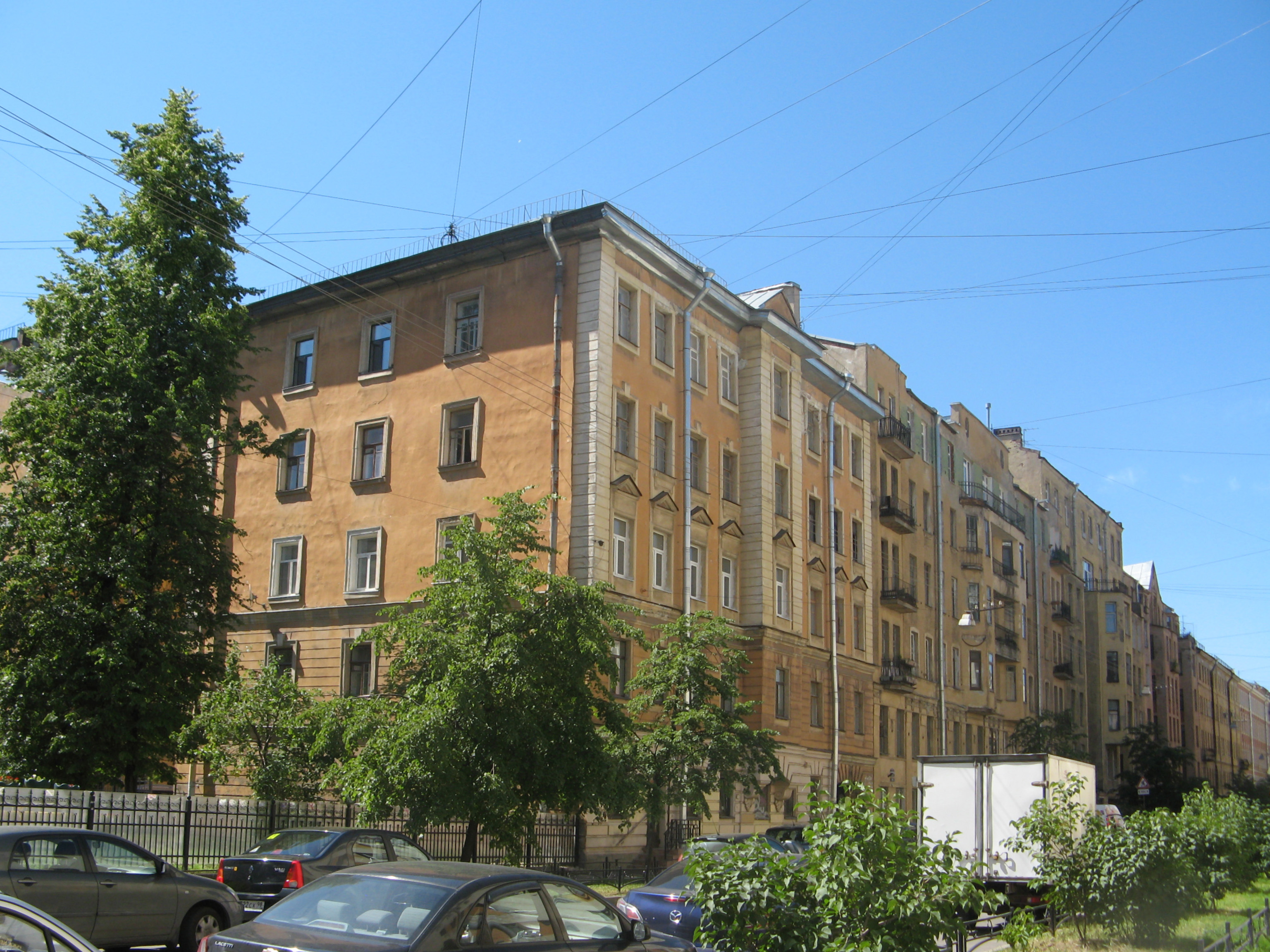 Санкт-Петербург Лахтинская ул., д. 18